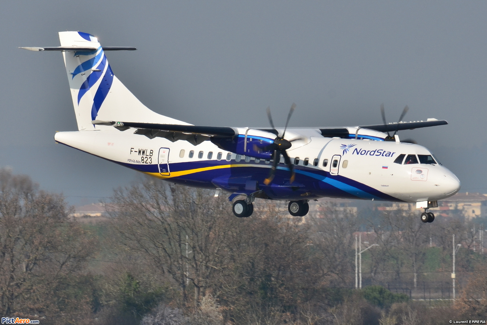 Photo prise à l'aéroport de Toulouse-Blagnac (LFBO) en France. Picture take at Toulouse-Blagnac Airport (LFBO) in France.